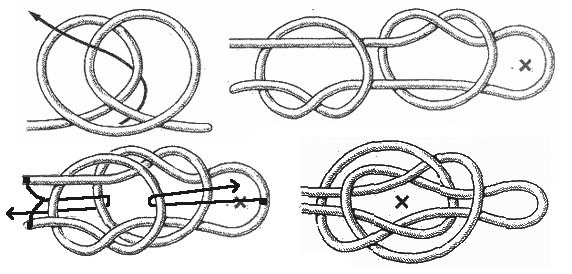 Простой способ вязки амфорного узла